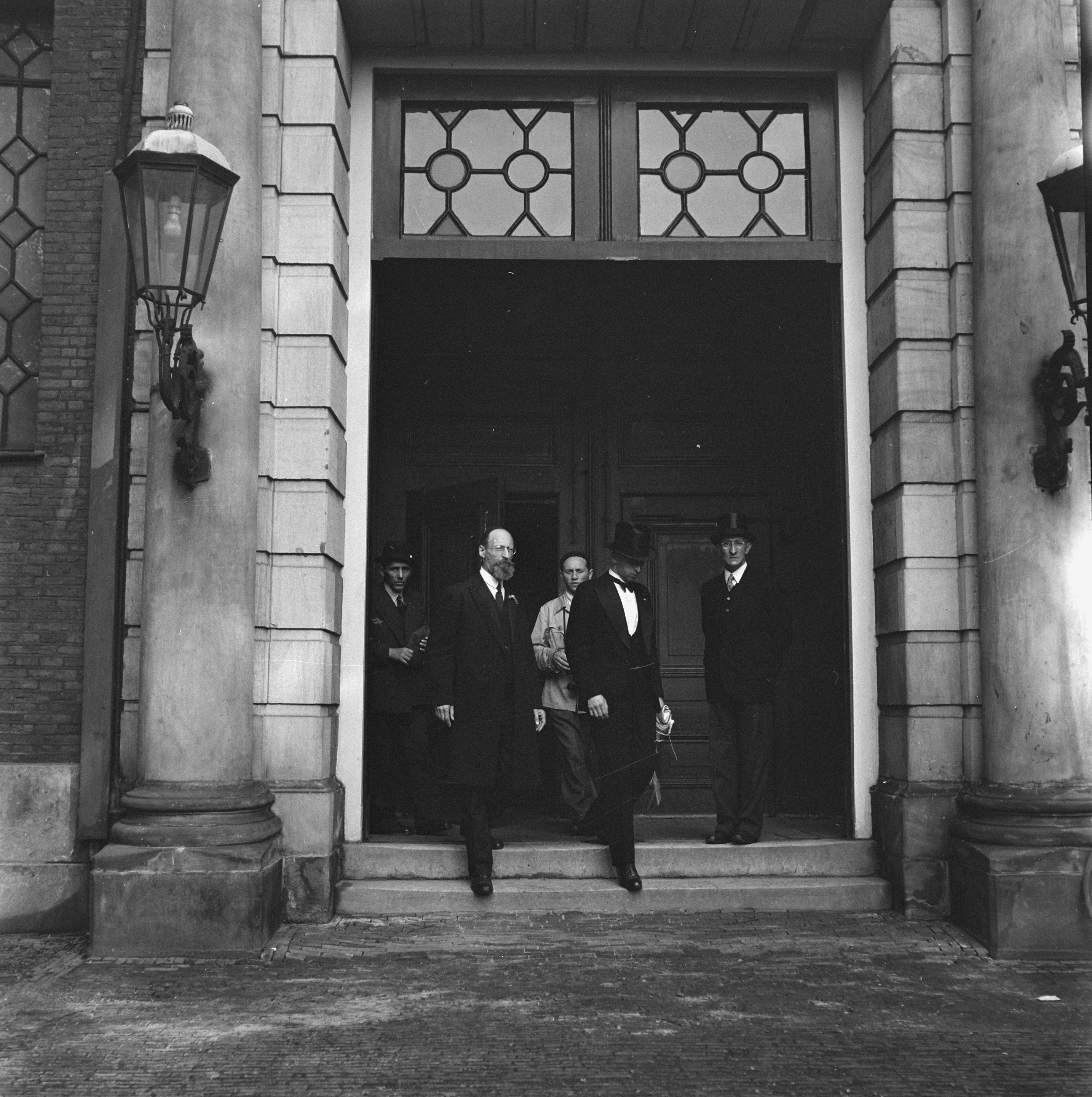 Collectie / Archief : Fotocollectie Anefo Reportage / Serie : [ onbekend ] Beschrijving : Opperrabbijn Tal verlaat de dienst Datum : 14 februari 1946 Trefwoorden : DIENST, opperrabbijn Persoonsnaam : tal Fotograaf : Woudhuyzen, Lou / Anefo Auteursrechthebbende : Nationaal Archief Materiaalsoort : Negatief (zwart/wit) Nummer archiefinventaris : bekijk toegang 2.24.01.03 Bestanddeelnummer : 901-4629